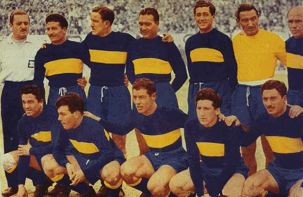 Boca campeon de Primera División 1954. Arriba: Lombardo, Mouriño, Colman, Otero, Musimessi y Pescia; abajo: Navarro, Baiocco, Borello, Rosello y Marcarián.